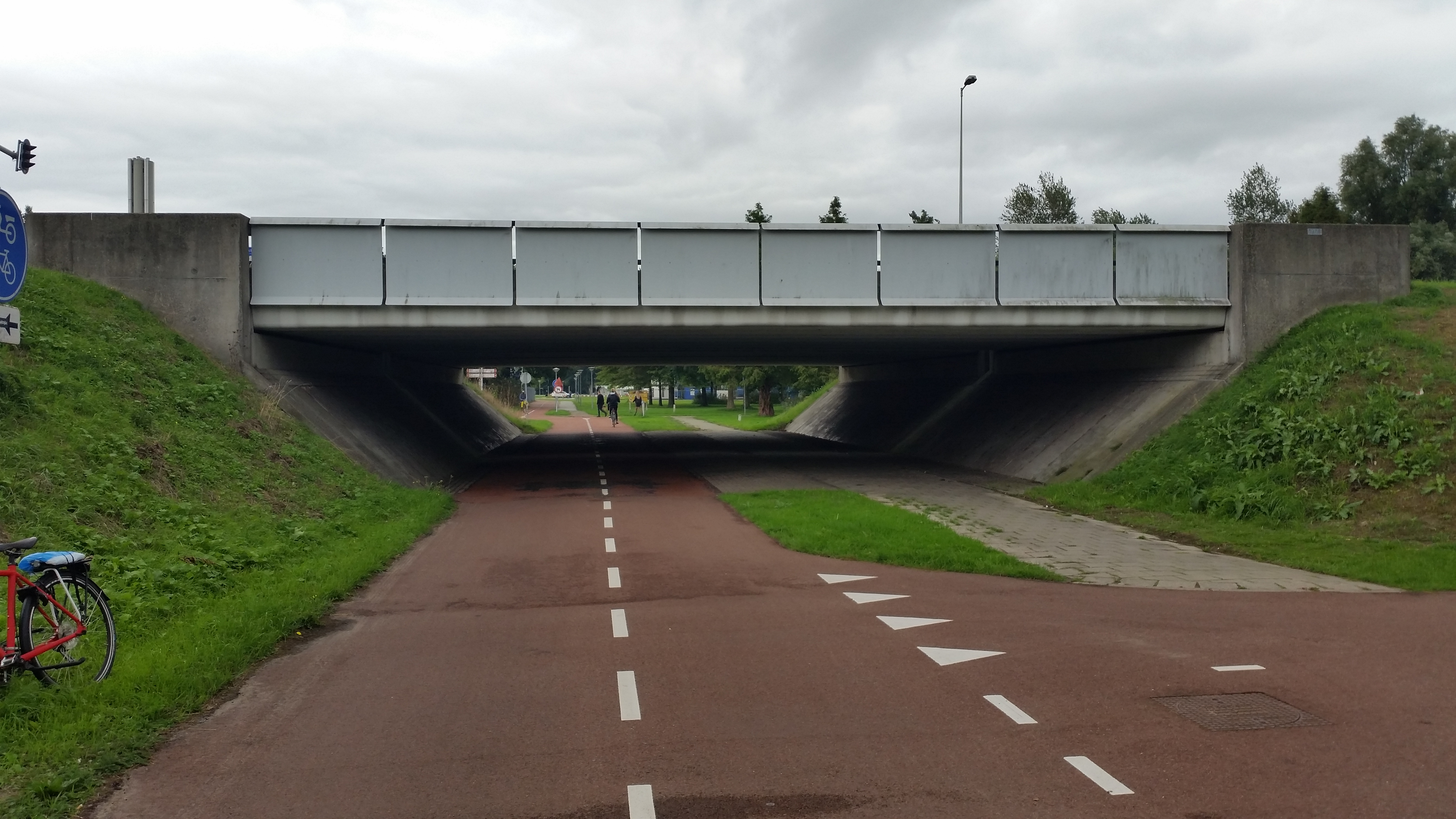 Brug 871, Meibergdreefbrug-West, zijaanzicht brug 1974